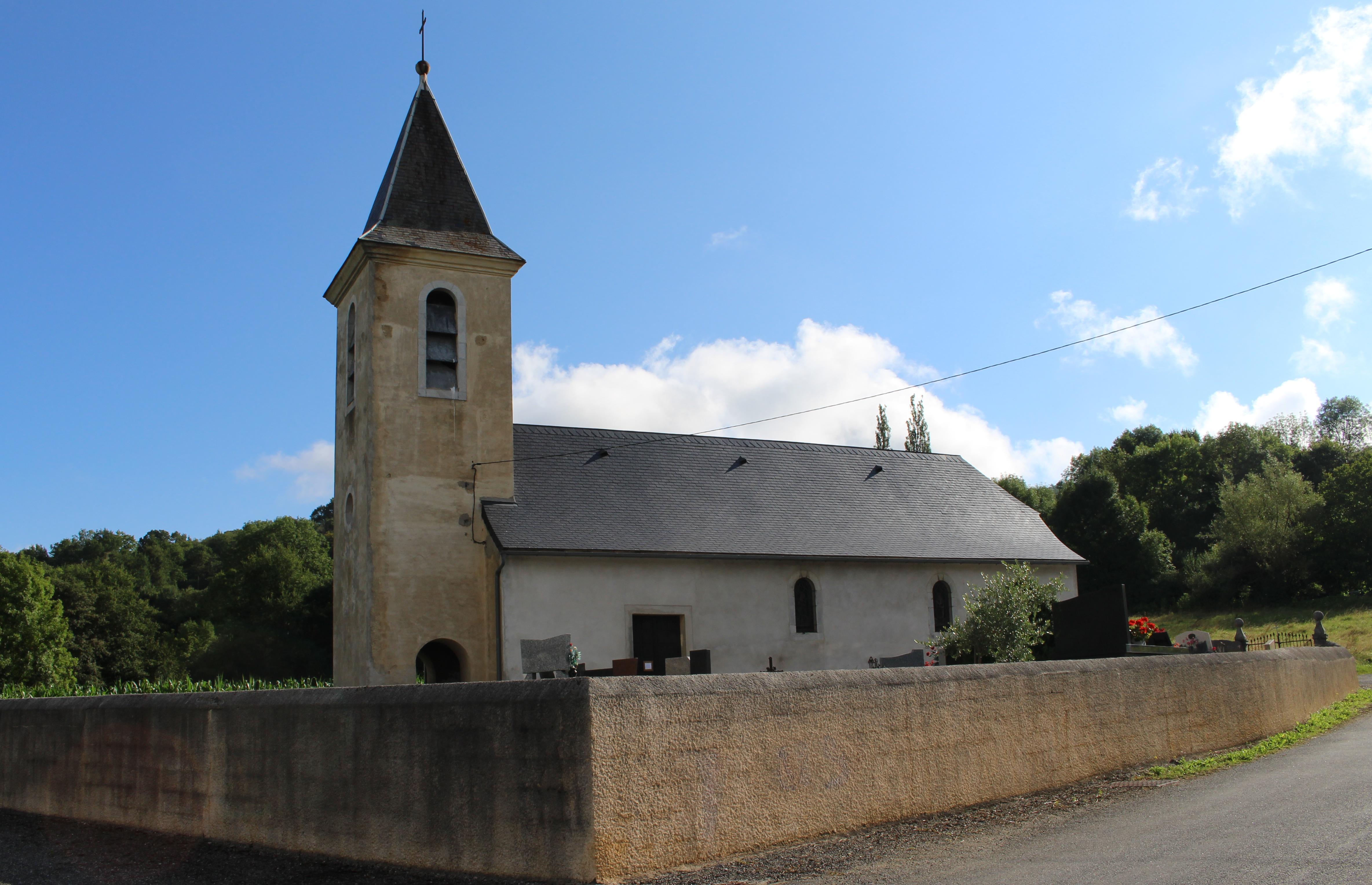 Église de l’Assomption de Gourgue (Hautes-Pyrénées)